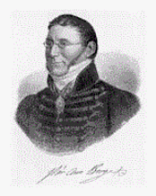 Pär Aron Borg, lärare, Sverige Note that the name is incorrectly spellt in the file name!